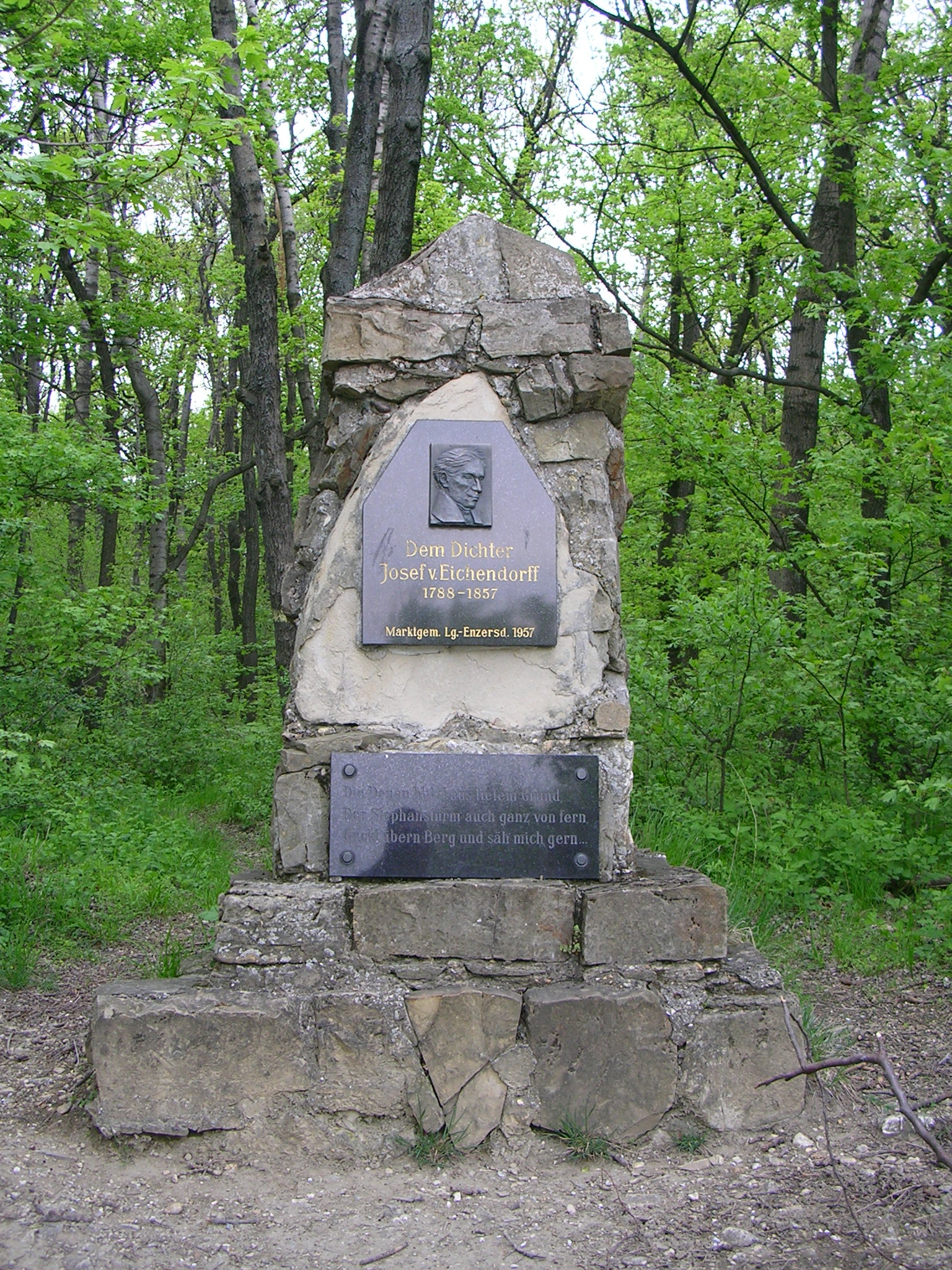 Memorial in Langenzersdorf (Falkenberg)